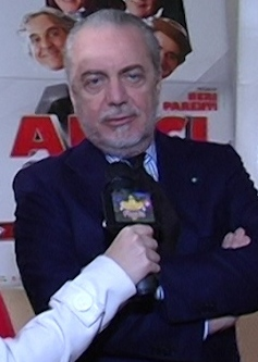 Intervista